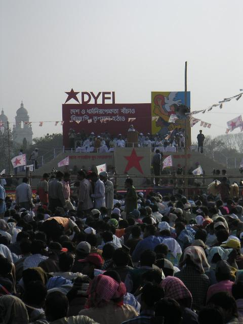 DYFI-manifestion i Kolkata 15 februari 2004. Foto: Soman